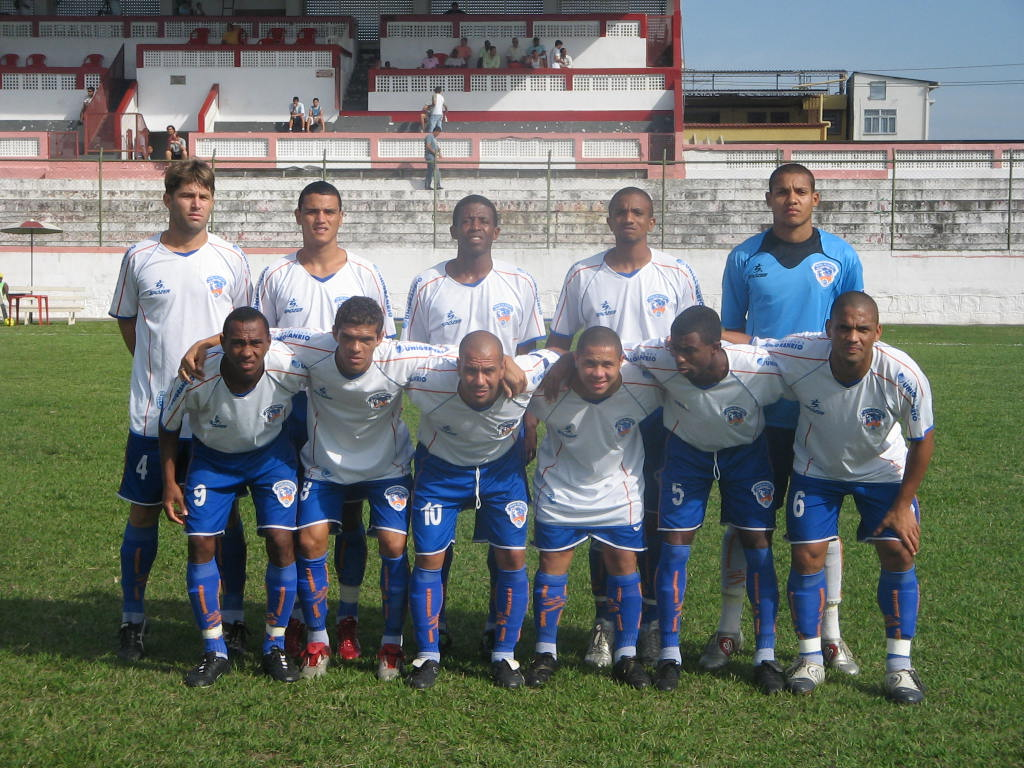 Equipe profissional do Duque de Caxias Futebol Clube, em 2007